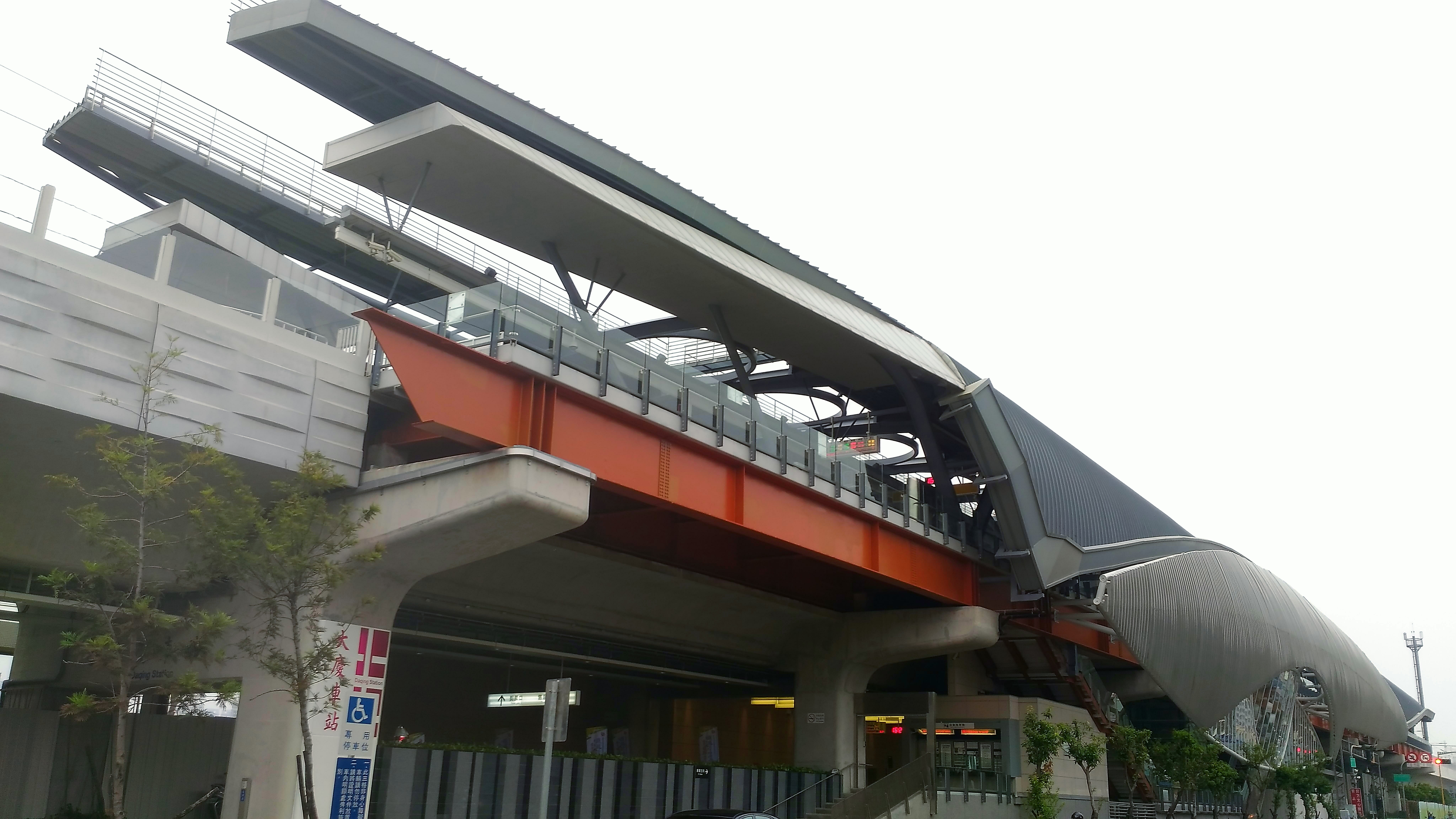 中文（台灣）: 大慶車站(新高架車站)